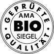 Schwarz-weißes AMA-Biosiegel: Gütesiegel für biologische Lebensmittel internationaler Herkunft